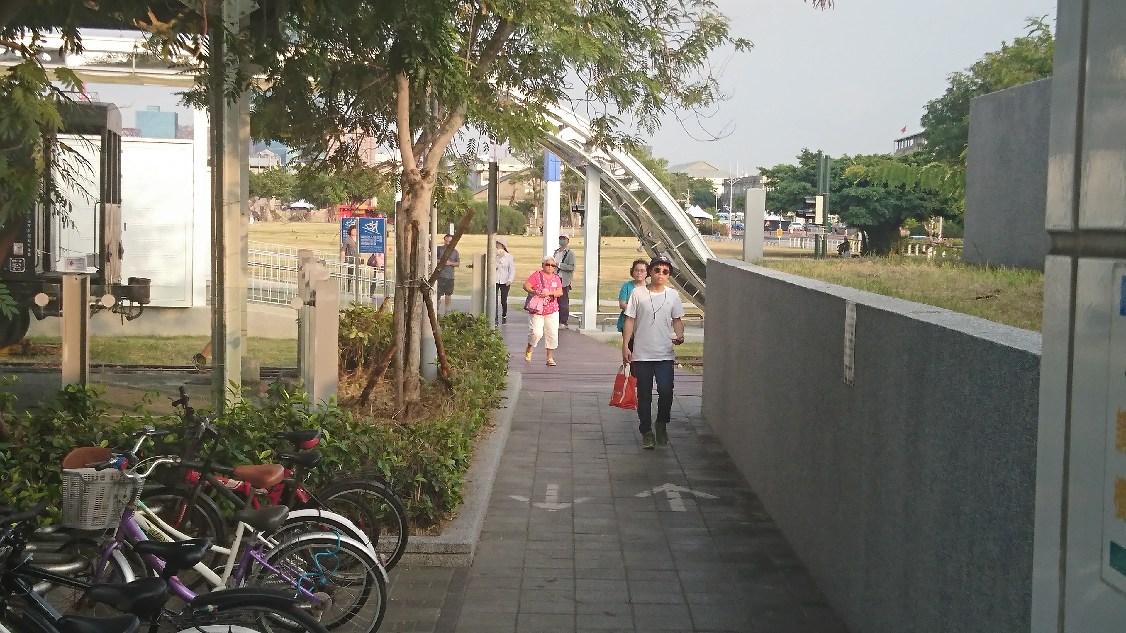 轉乘環狀輕軌與轉乘高雄捷運橘線的必經之路